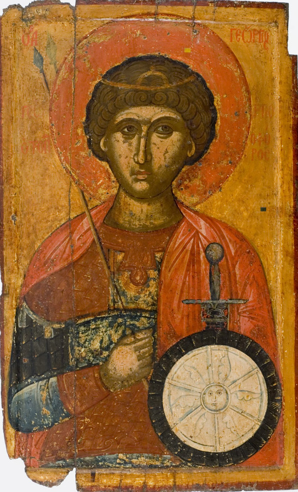 Ο Άγιος Γεώργιος Α΄ μισό 16ου αι. Άγιος Γεώργιος του Γραμματικού, Βέροια